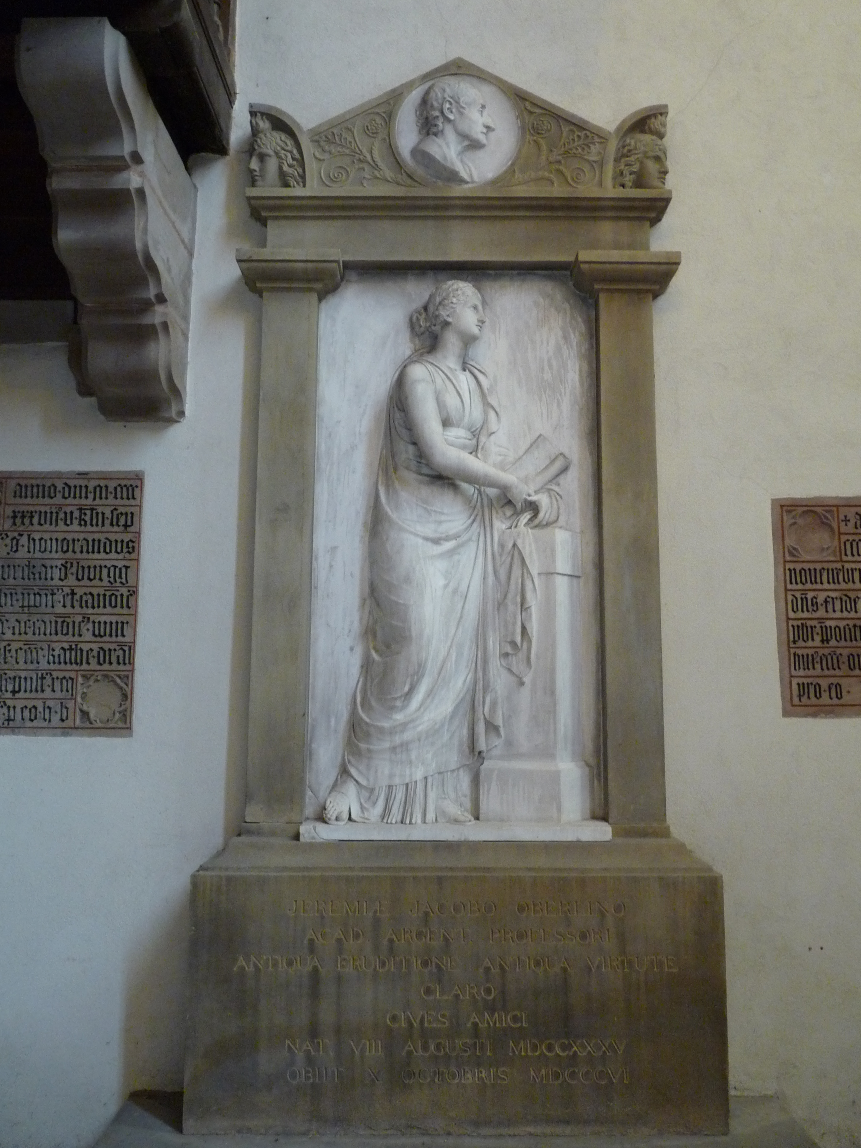 Stèle de Jérémie Jacques Oberlin à l'église Saint-Thomas de Strasbourg (oeuvre du sculpteur Landolin Ohmacht, inaugurée en 1811)